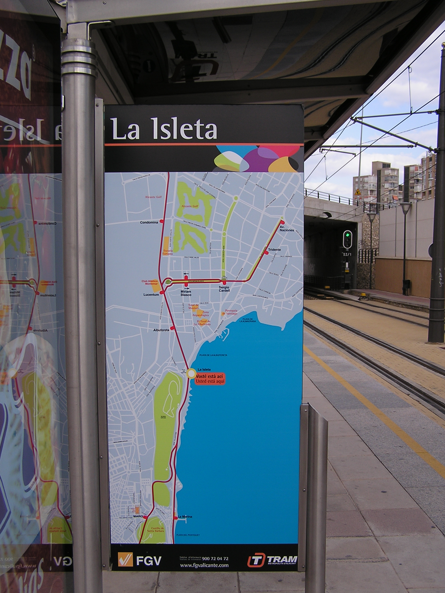 La Isleta. Tram Stop. Alicante Tram.